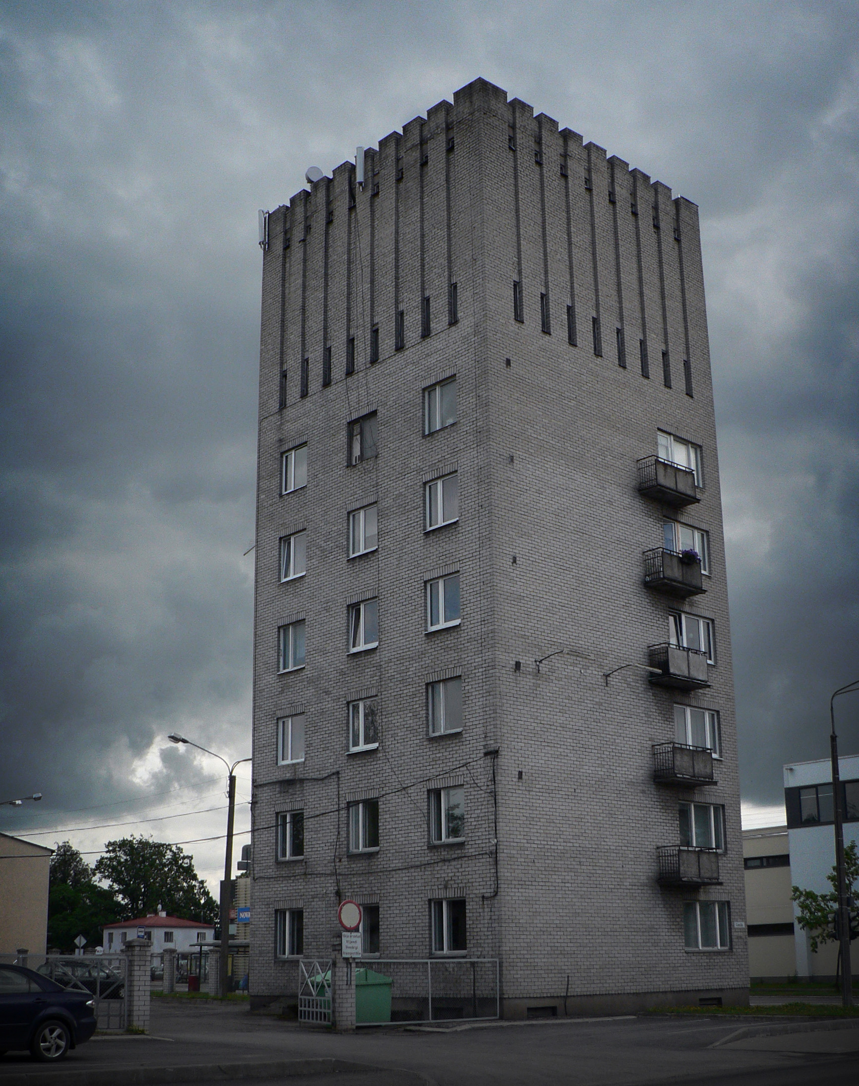 Veetorn-elamu Viljandis, C. R. Jakobsoni 3.